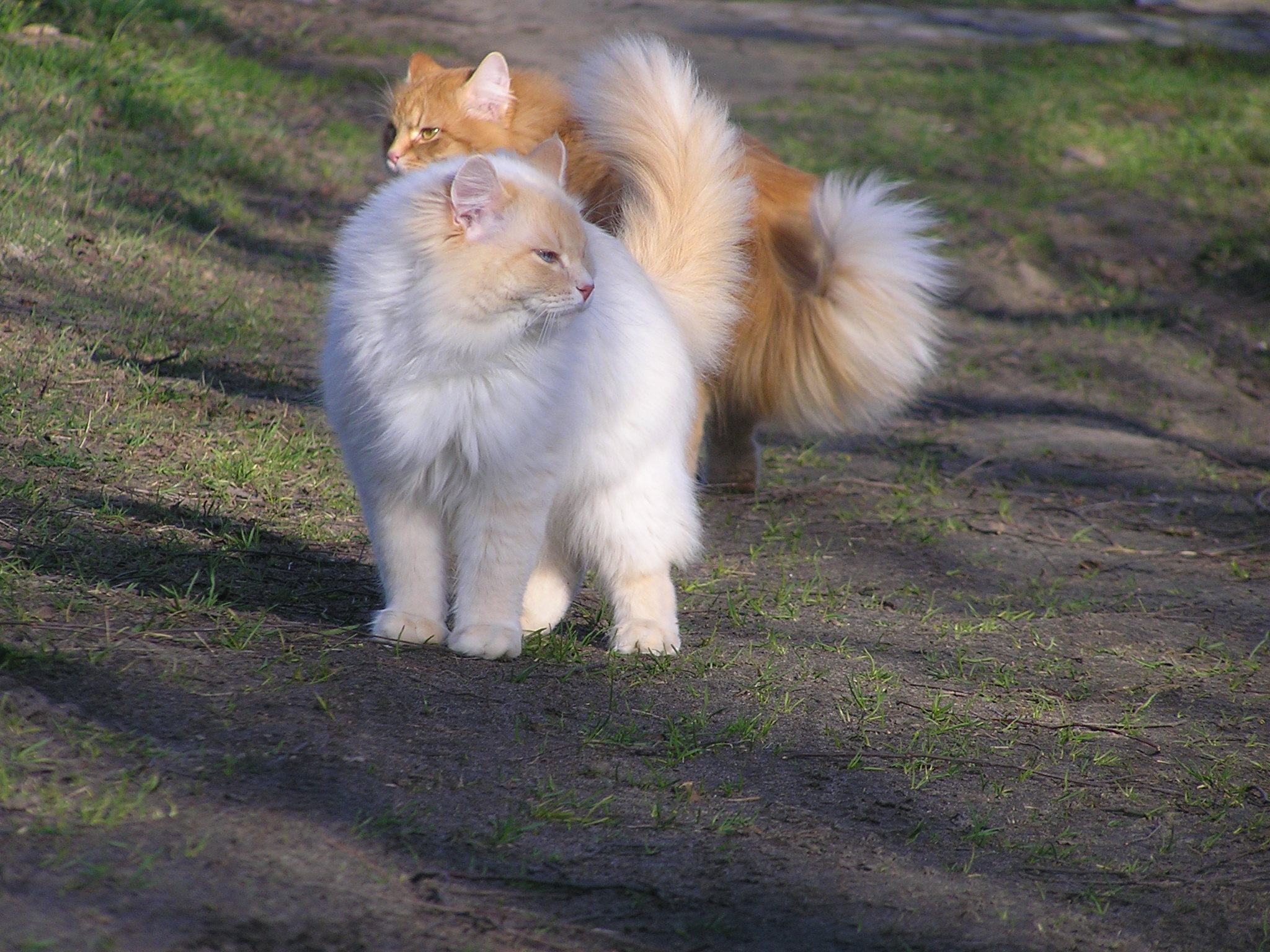 Siberians named Jurij Petrowitsch vom Hohen Timp and Nikolka Petrowitsch vom Hohen Timp